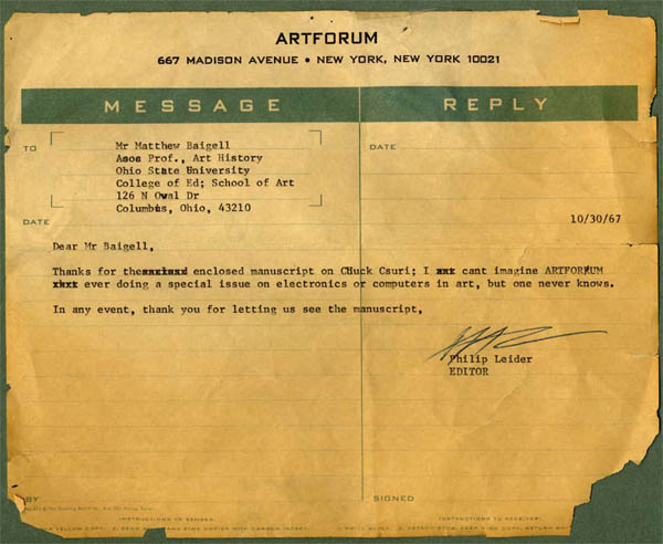 Detalle de correspondencia contractual de Artforum, revista de arte y arquitectura (1967)